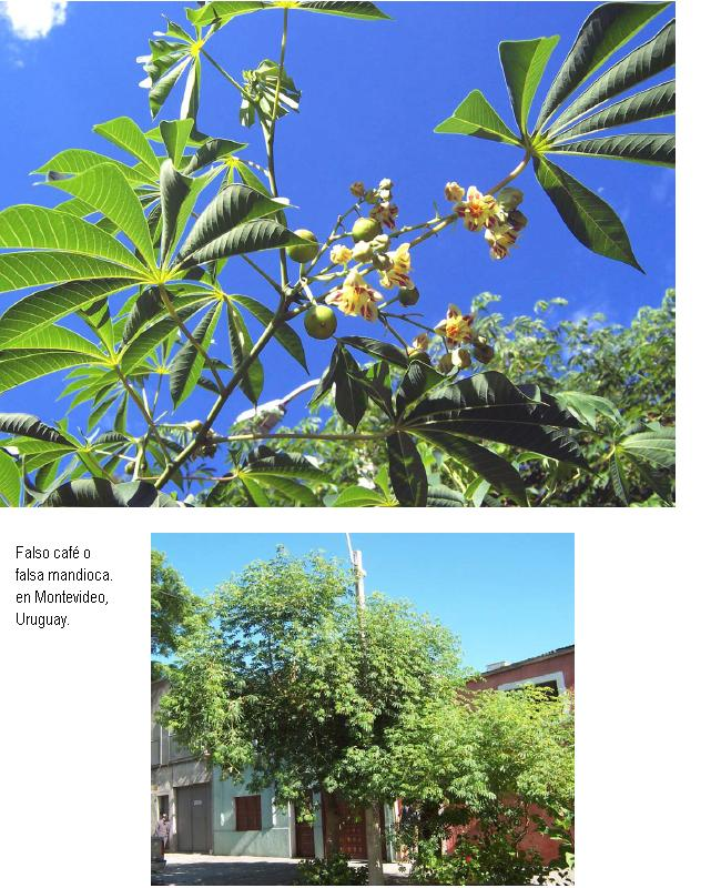 "Falso café" o "falsa mandioca" (manihot grahamii).